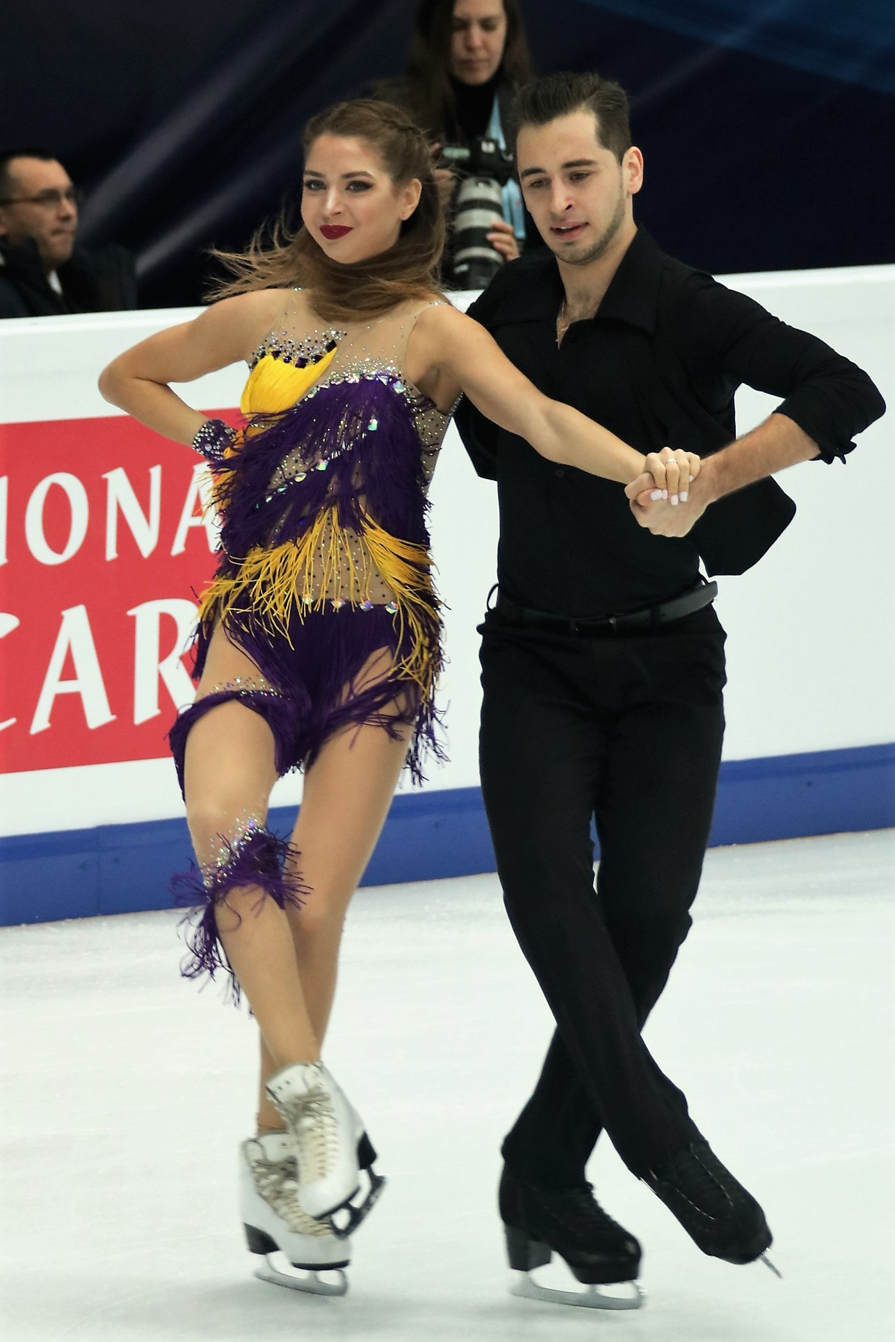 Александра Назарова / Максим Никитин (Украина) на Чемпионате Европы по фигурному катанию 2018.